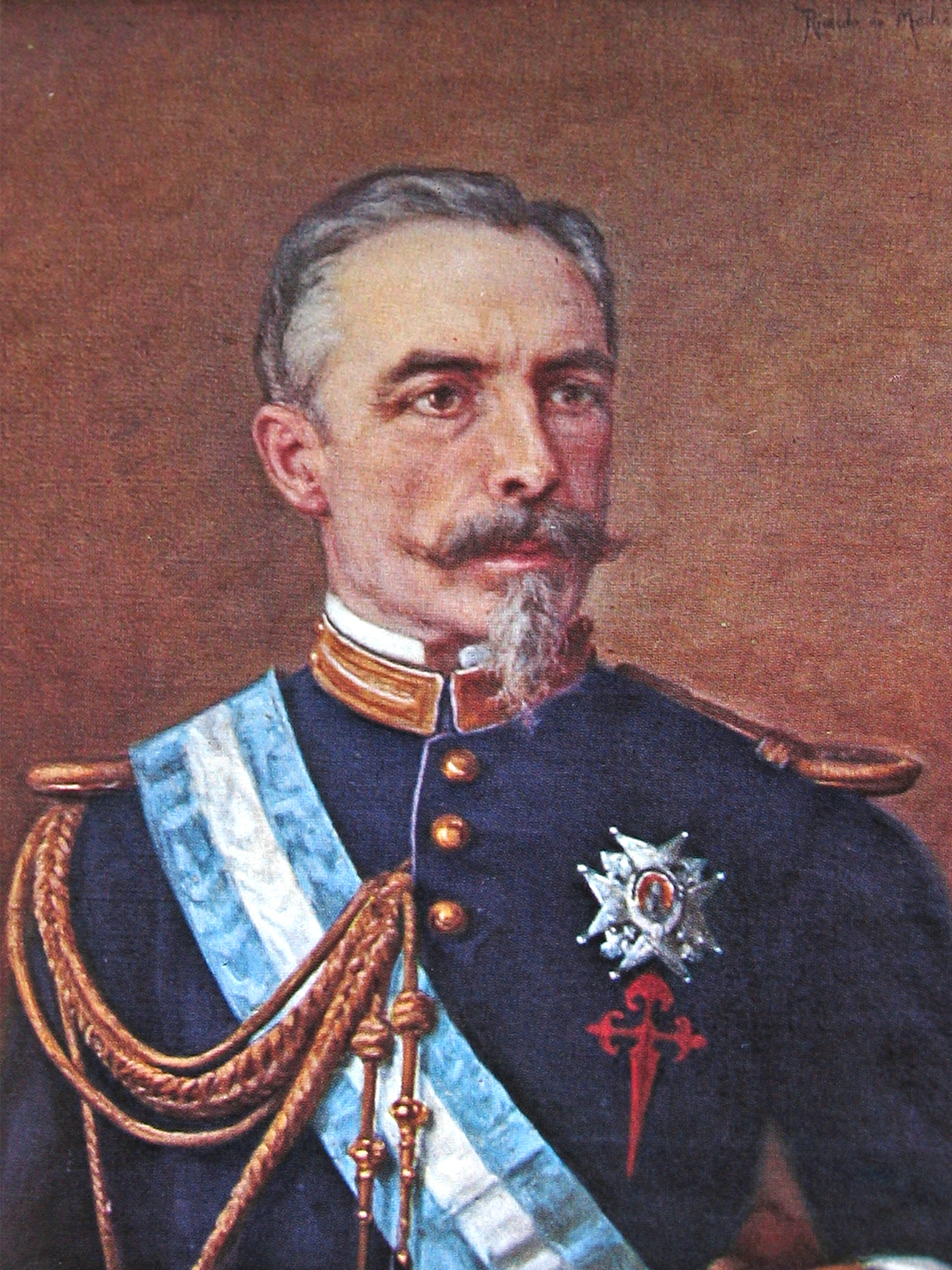 José Manuel de Goyeneche y Gamio, Conde de Guaqui, Duque de Villahermosa